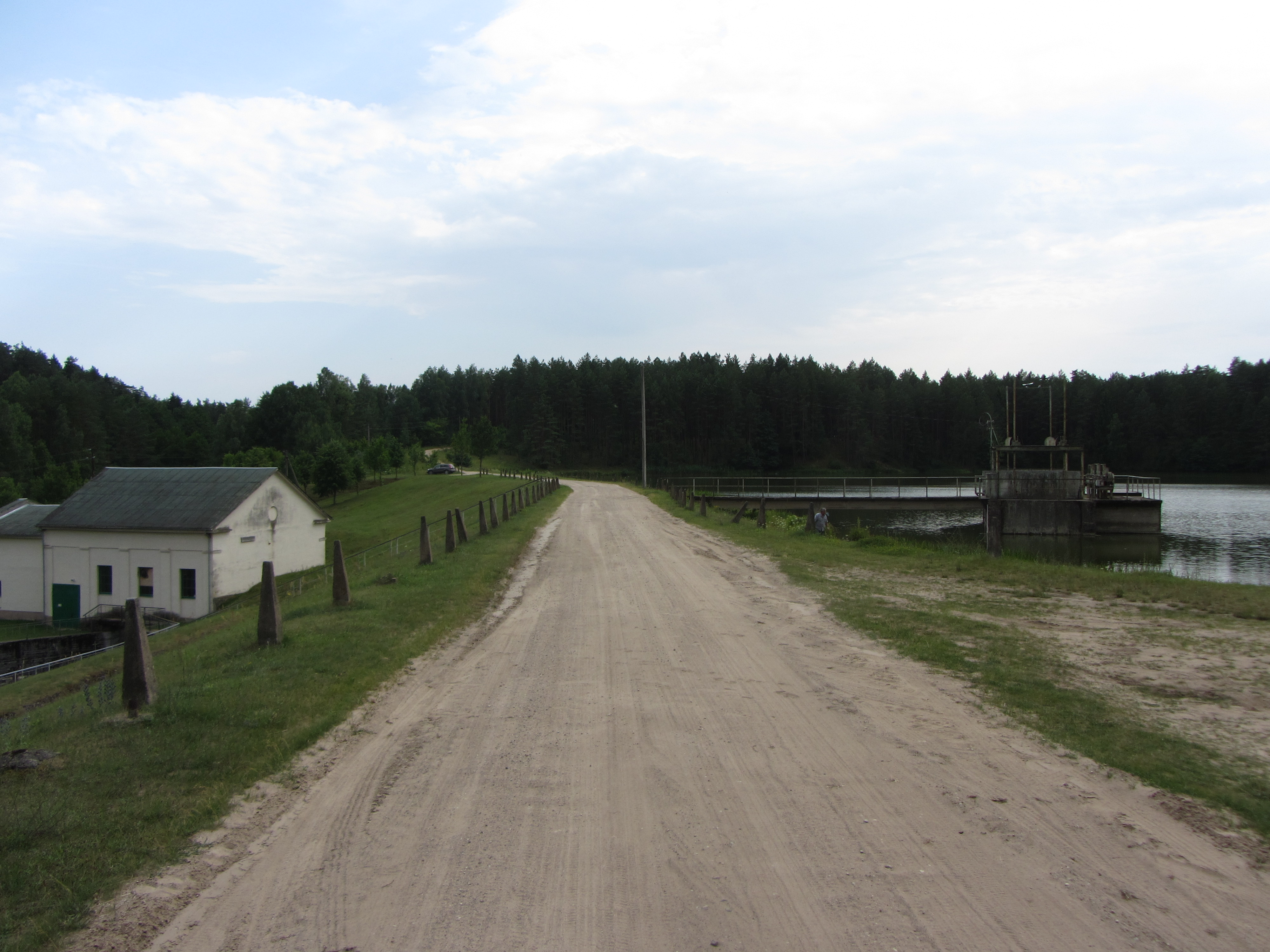 Leipalingio sen., Lithuania